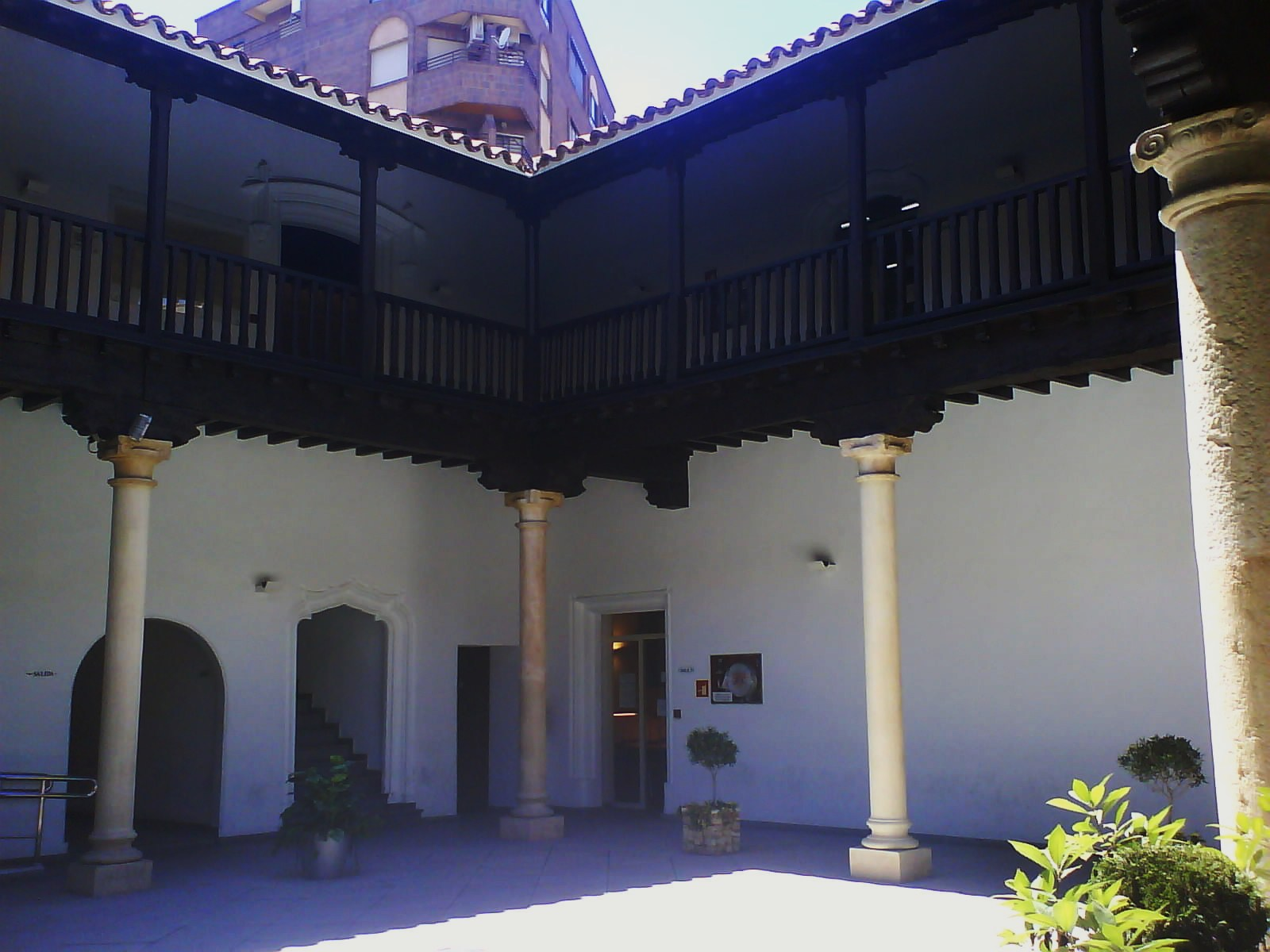 Posada del rosario de Albacete, típico edificio manchego